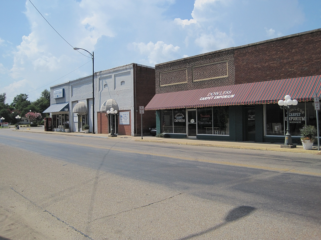 Monette, Arkansas